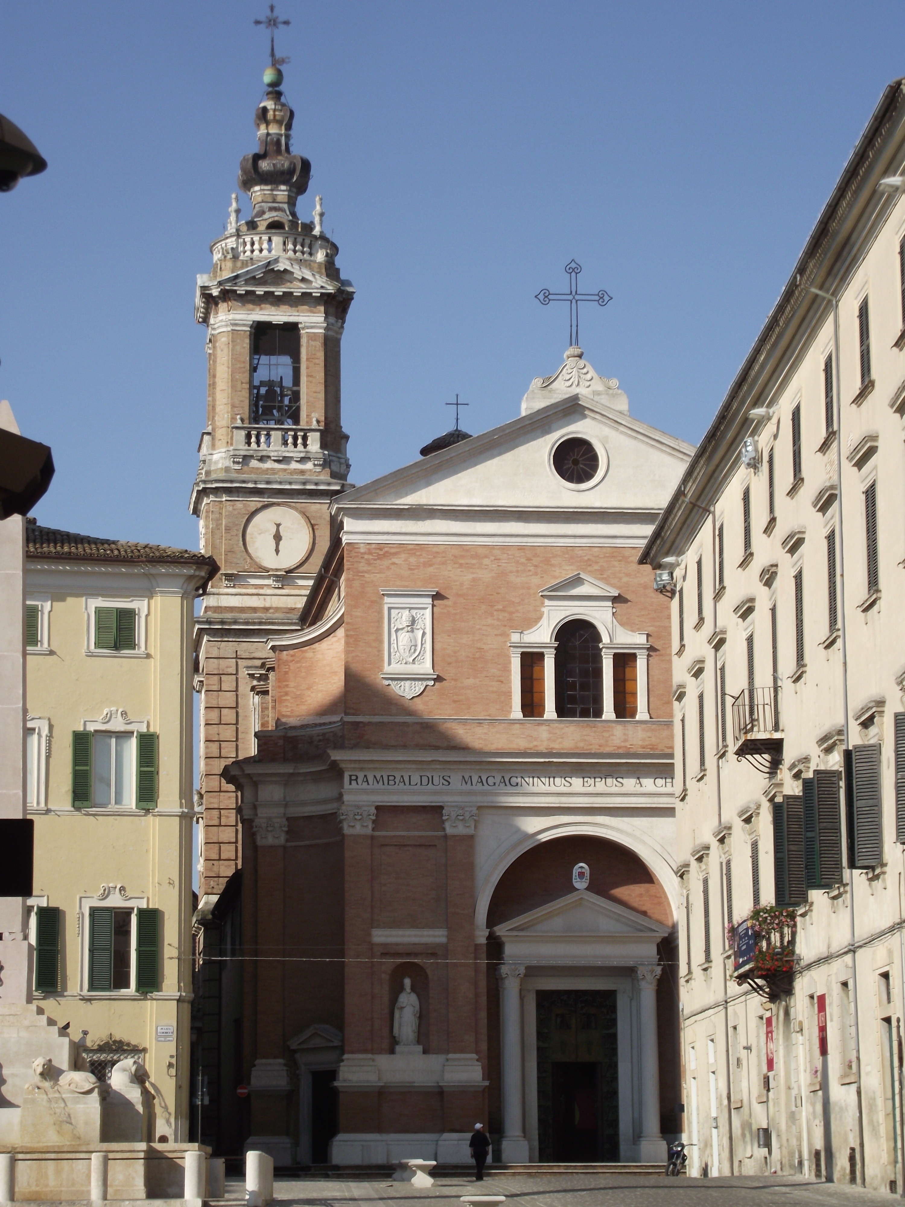 Jesi, Piazza Federico II, Duomo di San Settimio